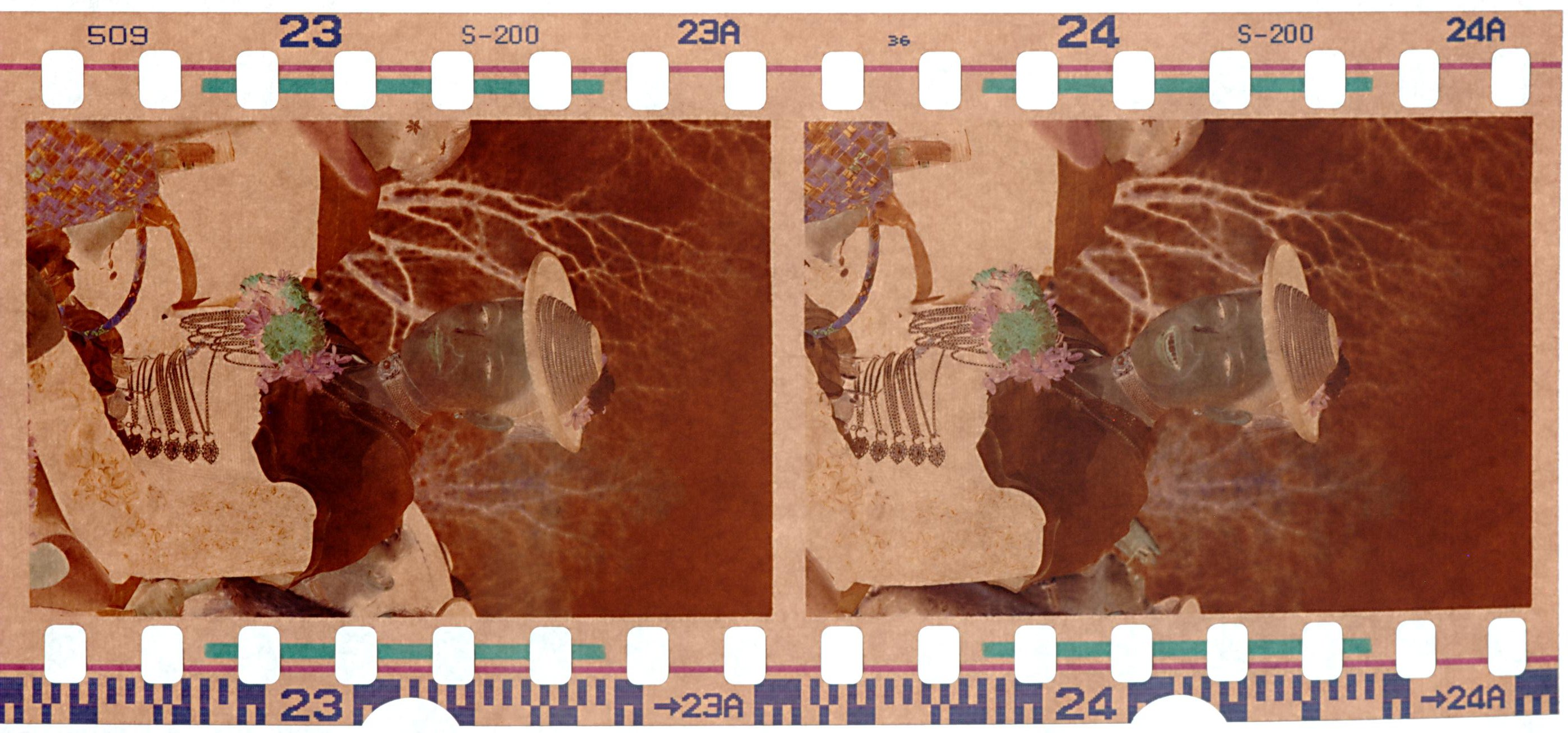 Beispiel eines Farb-Negativ-Filmstreifens, Kleinbild, Fuji Superia 200